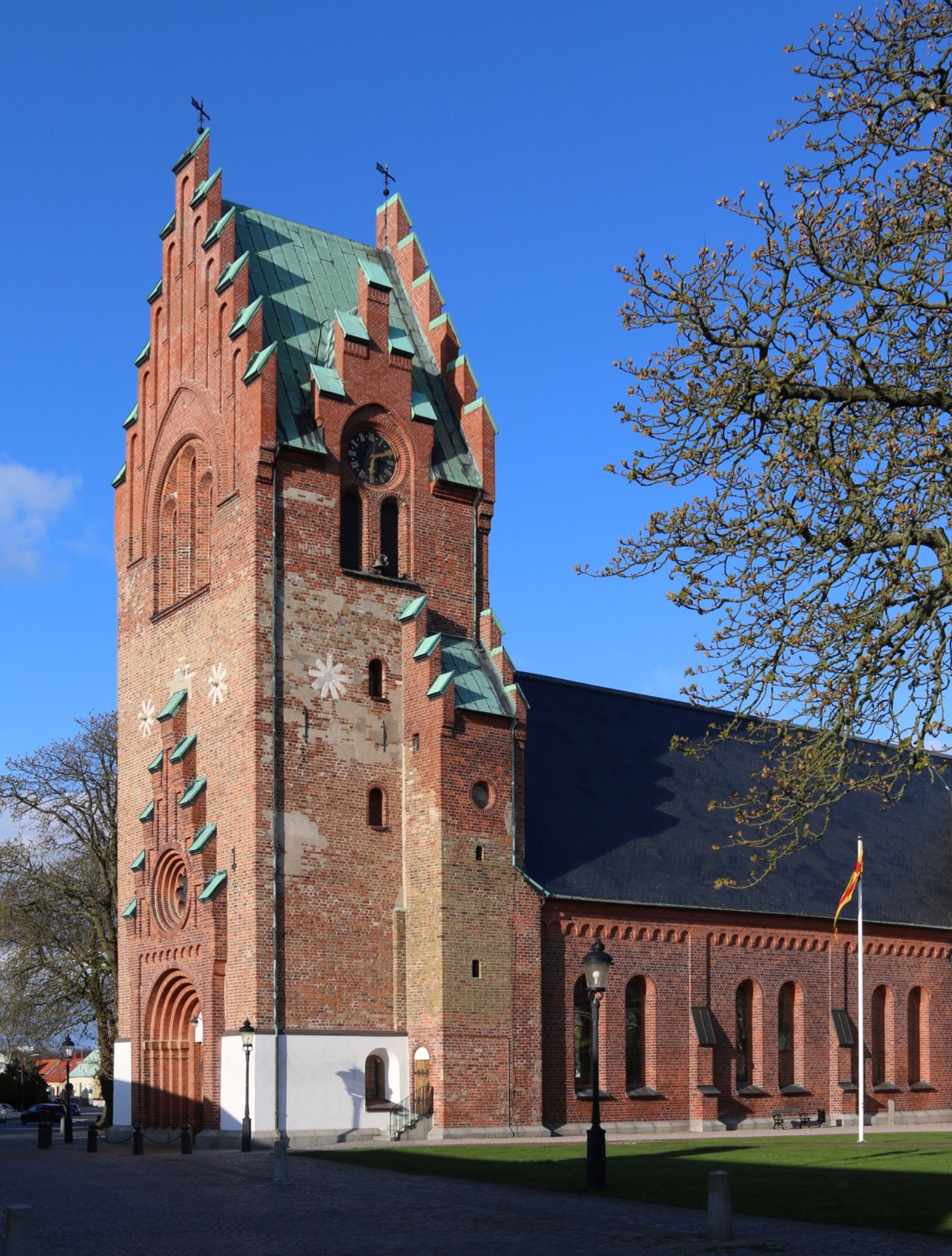 Sankt Nicolai kyrka, Trelleborg